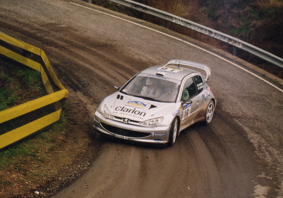 Gronhölm, Rally Catalunya 2000